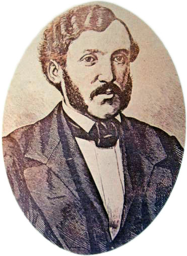 Константин Миладинов